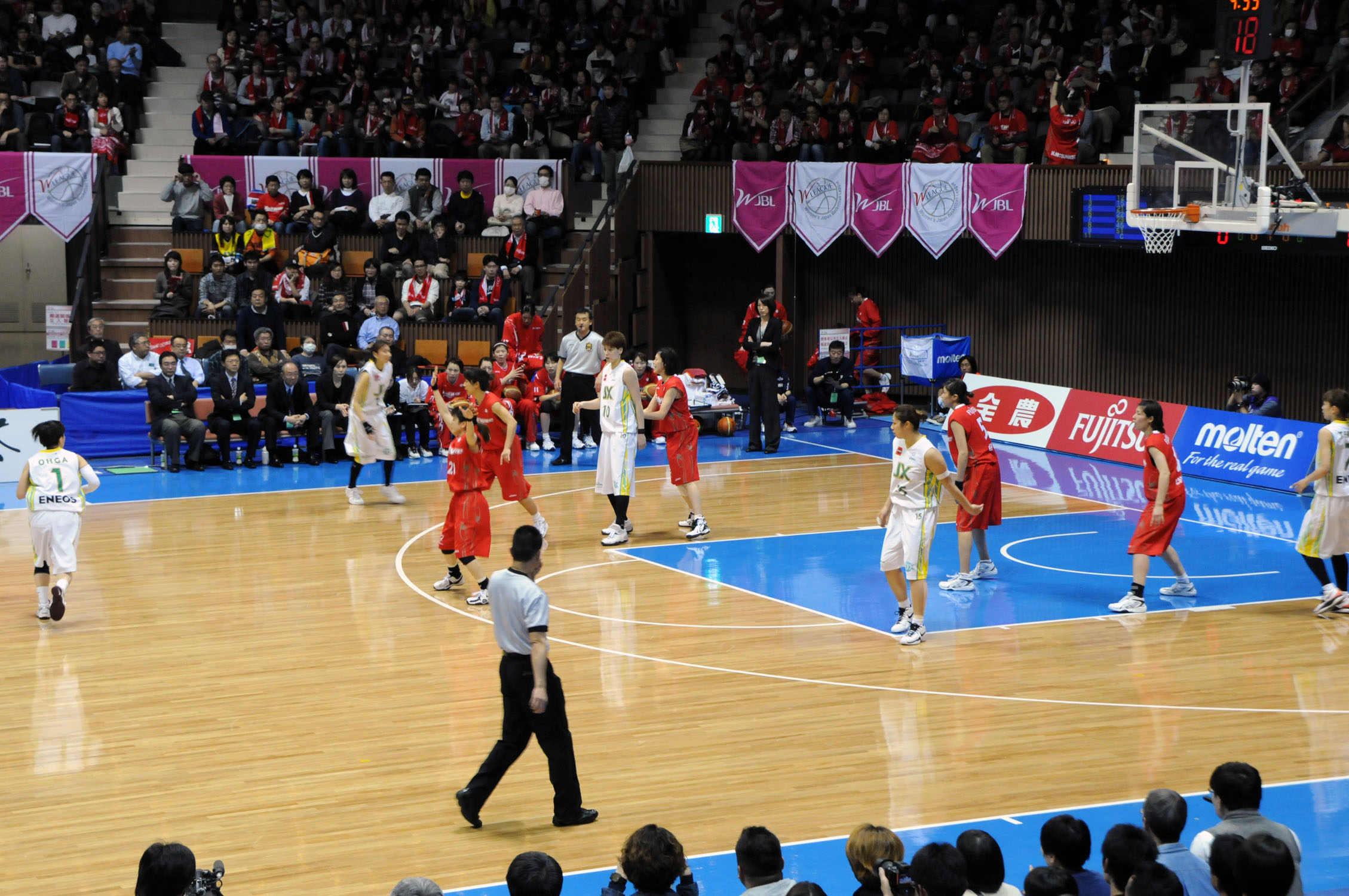 WJBL 10-11プレーオフセミファイナル、富士通対JX。代々木第二体育館で。